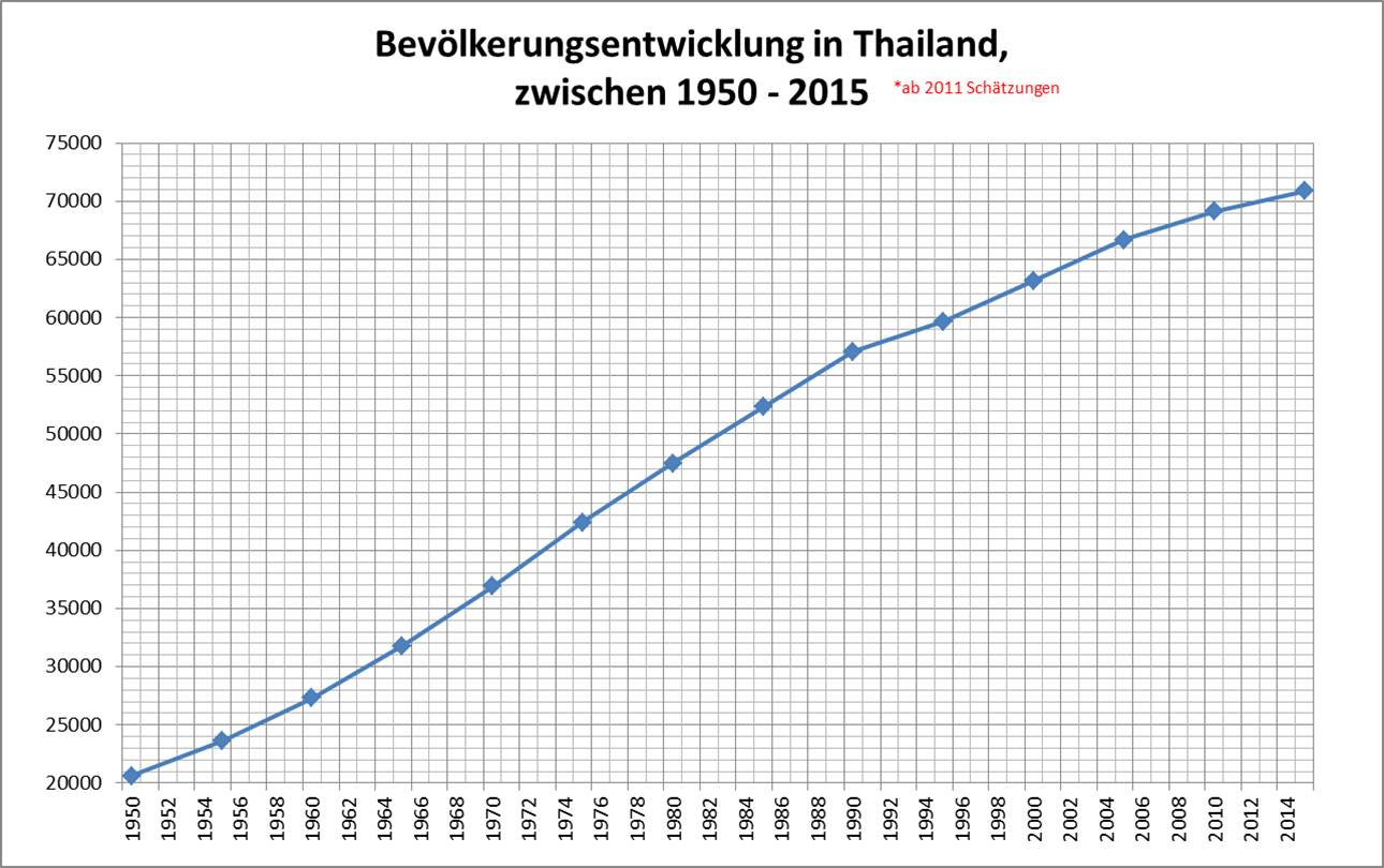 Entwicklung der Bevölkerung in Thailand, zwischen 1950 - 2015